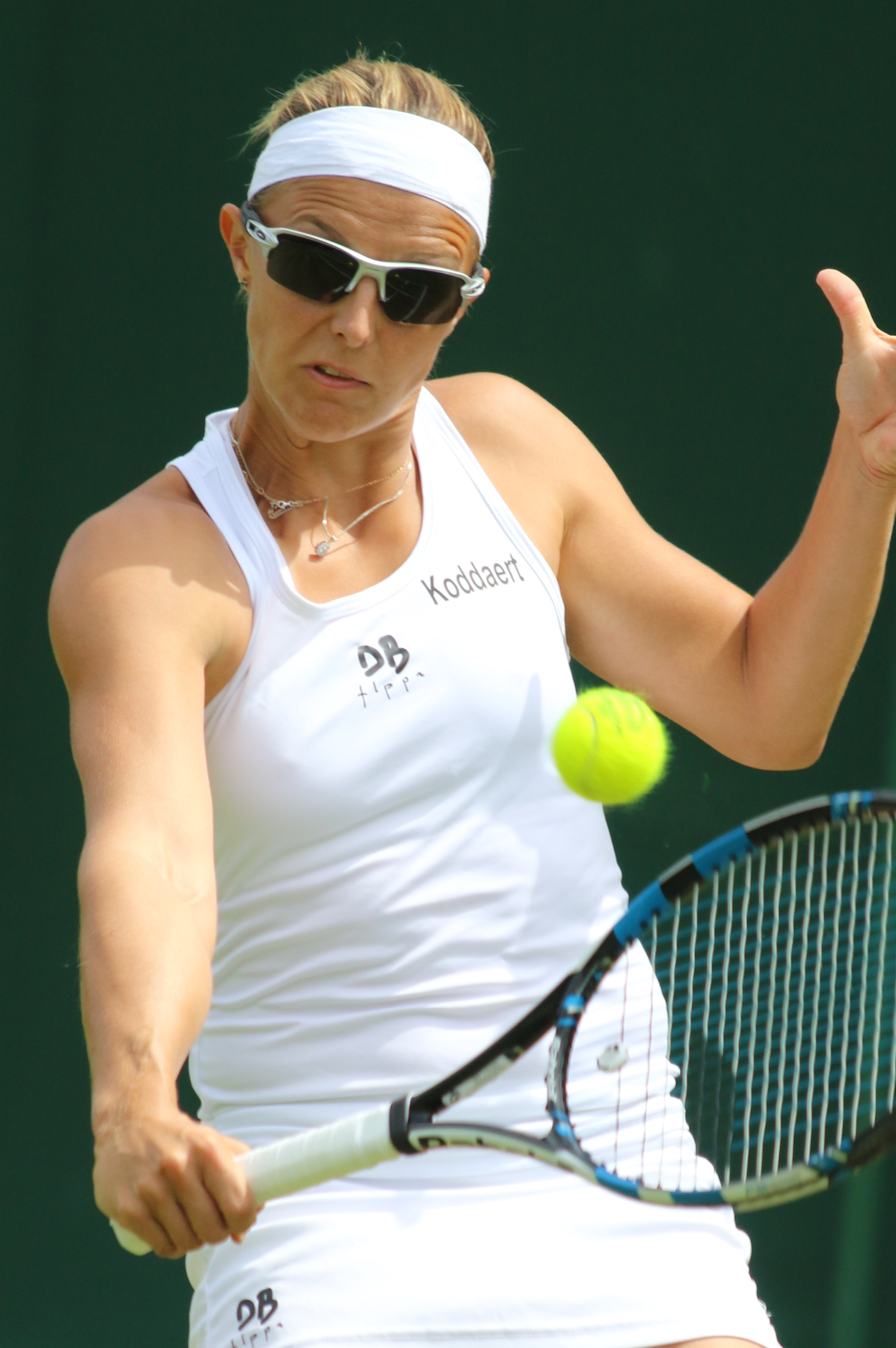 Flipkens WM17 (17)